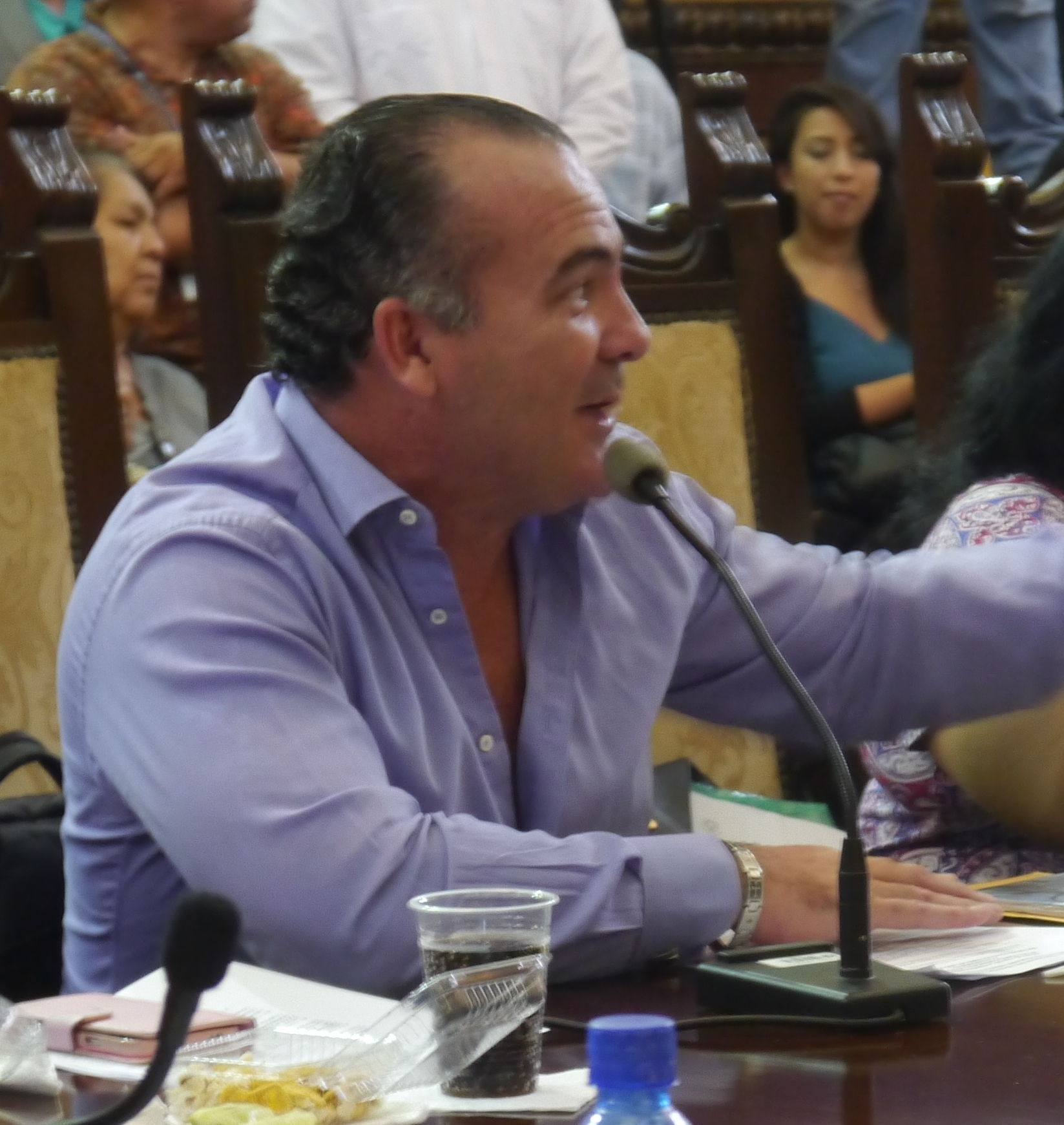 Concejal Gustavo Navarro en sesión del Concejo Municipal de Guayaquil